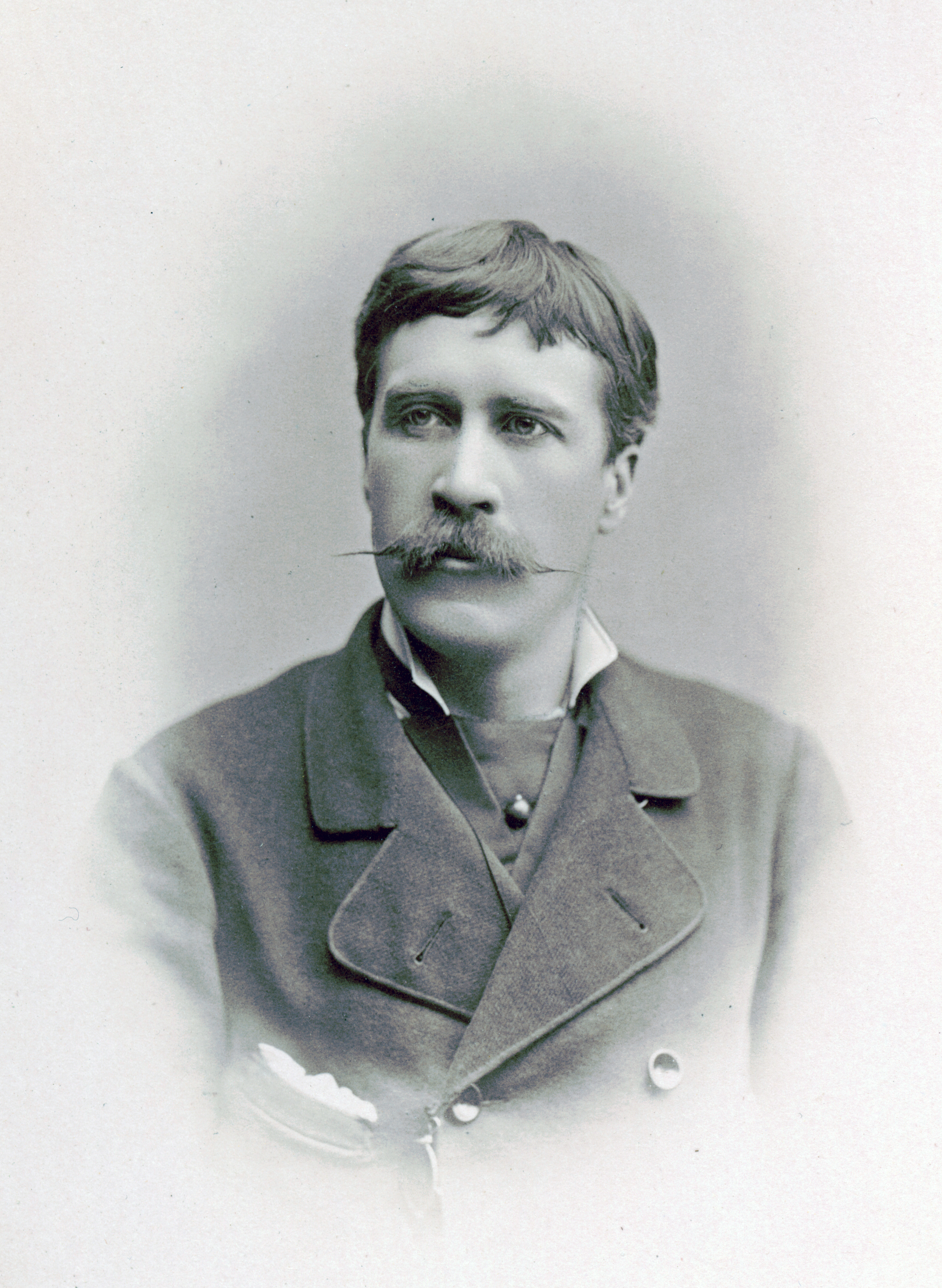 Henrik Christiernsson, direktör för Södra teatern 1891